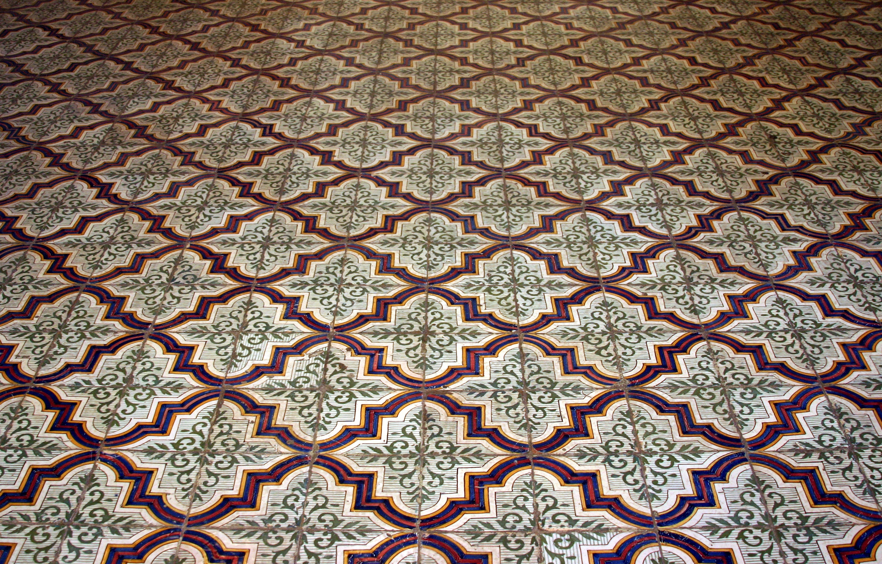 Castel Nuovo - Nápoles